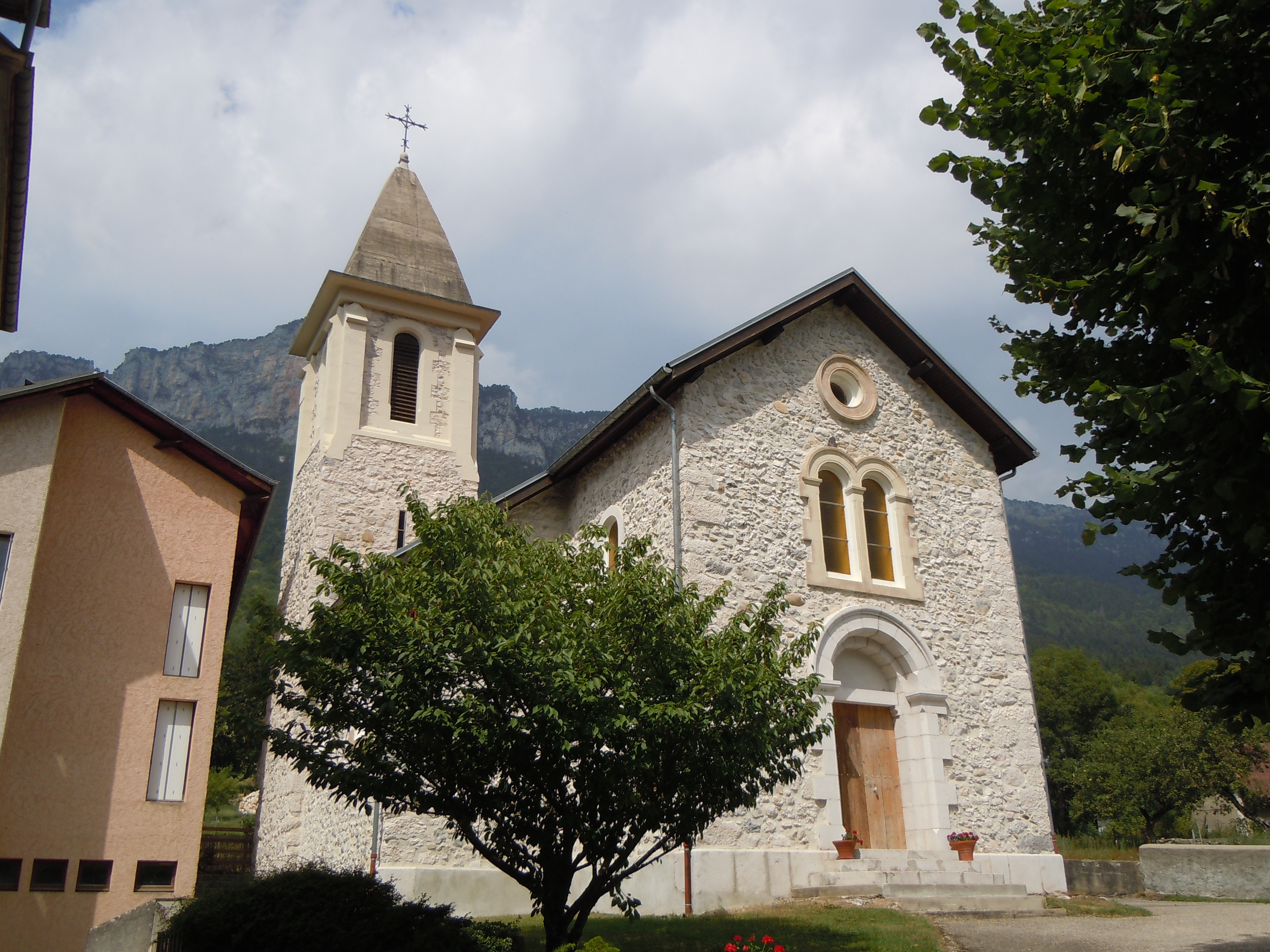 Sainte-Marie-du-Mont (Eglise) Isère